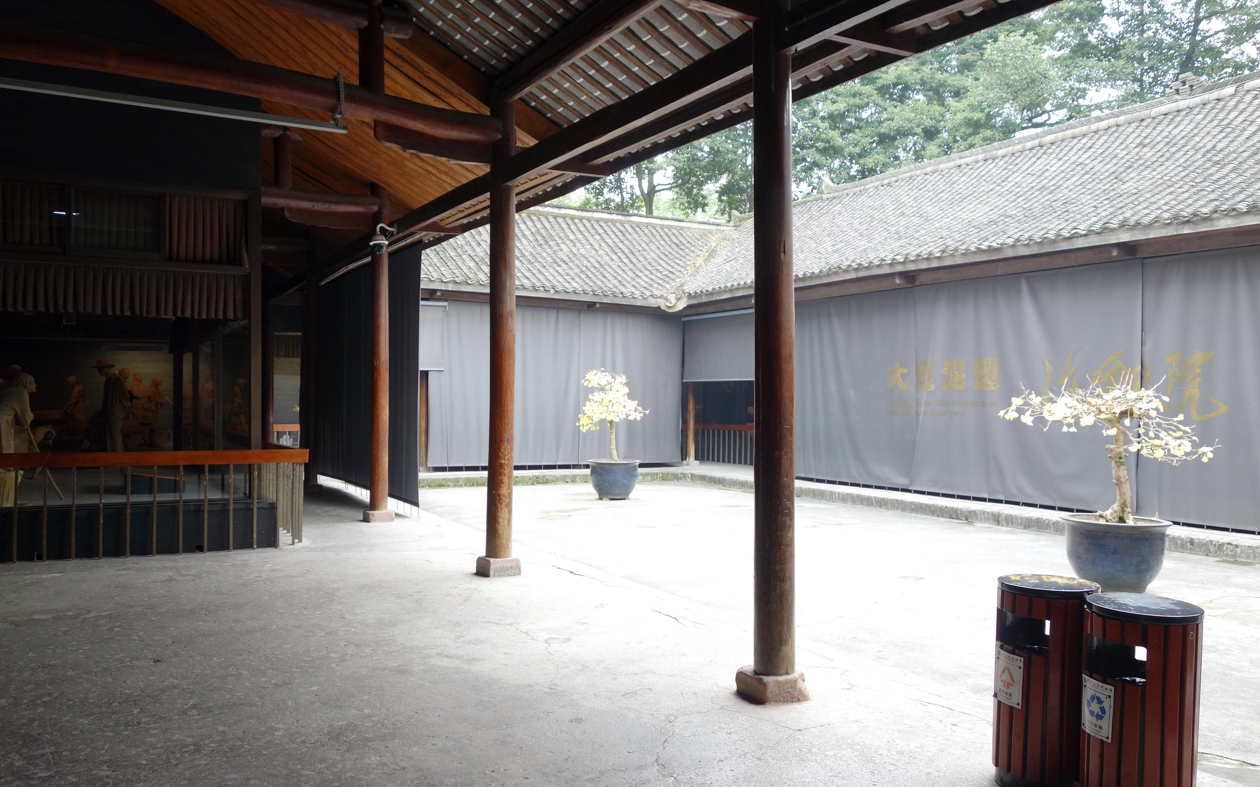 大邑刘氏庄园博物馆展出大型泥塑《收租院》